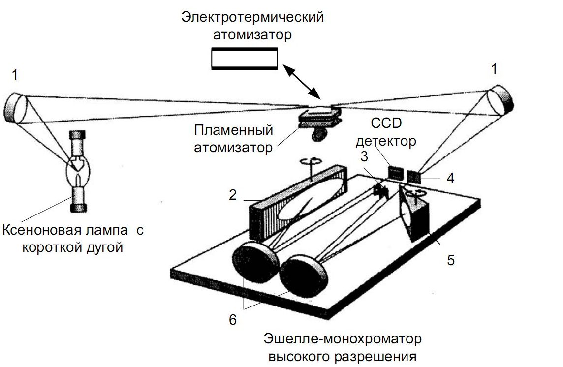 Оптическая схема ААС высокого разрешения с источником непрерывного спектра продвижение сайта Донецк